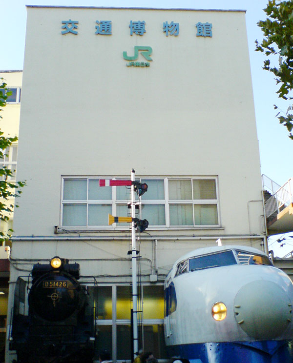 Kotsu Hakubutsukan Museum